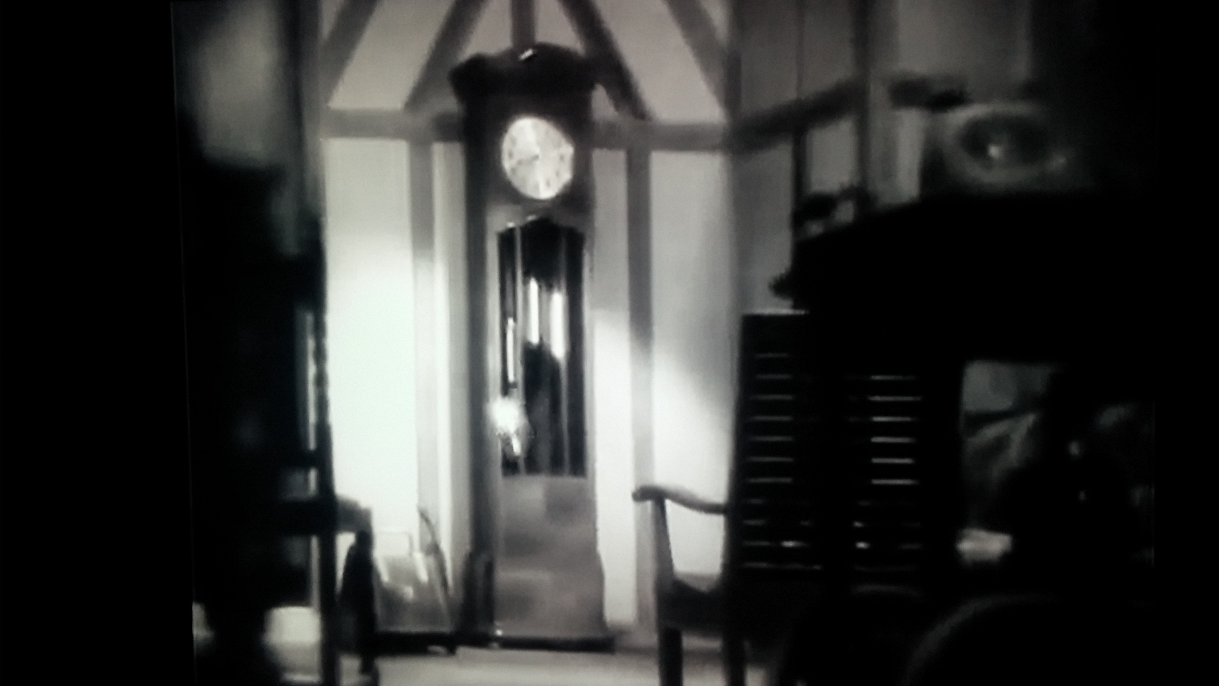 Fotograma de "Amad a la madre" (1934)